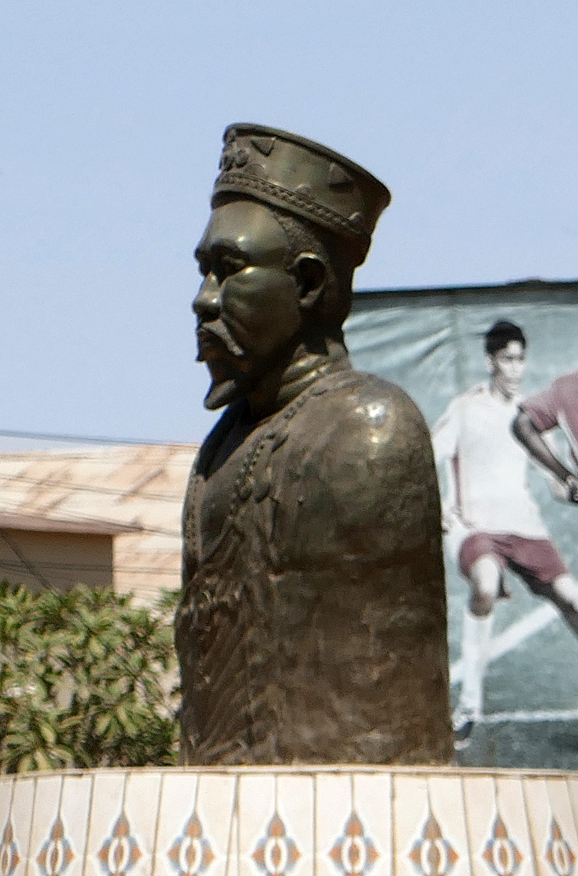 Monument à la mémoire du grand-père du chef, Naaba Zanre (1929-1973), sur un rond-point de Koupéla (Burkina Faso).